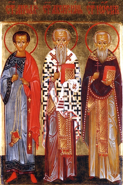 Svatí Acepsimas, Joseph and Aeithalas